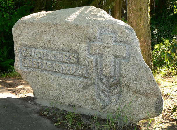 Stein am Eingang Geistliches Rüstzentrum Krelingen